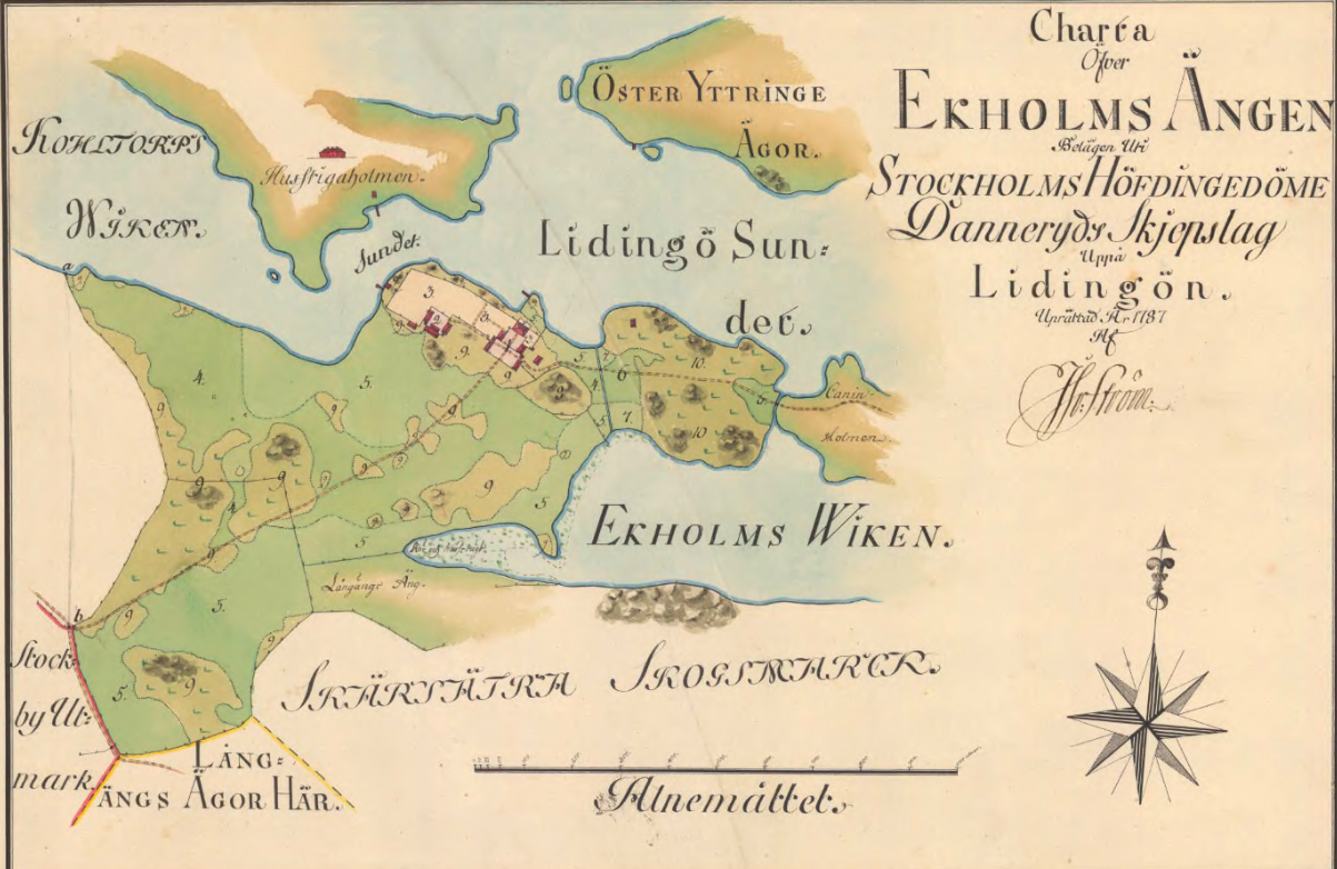 Ägomätning för Ekholmsnäs gård 1787 upprättad av lantmätare Israel Ström.